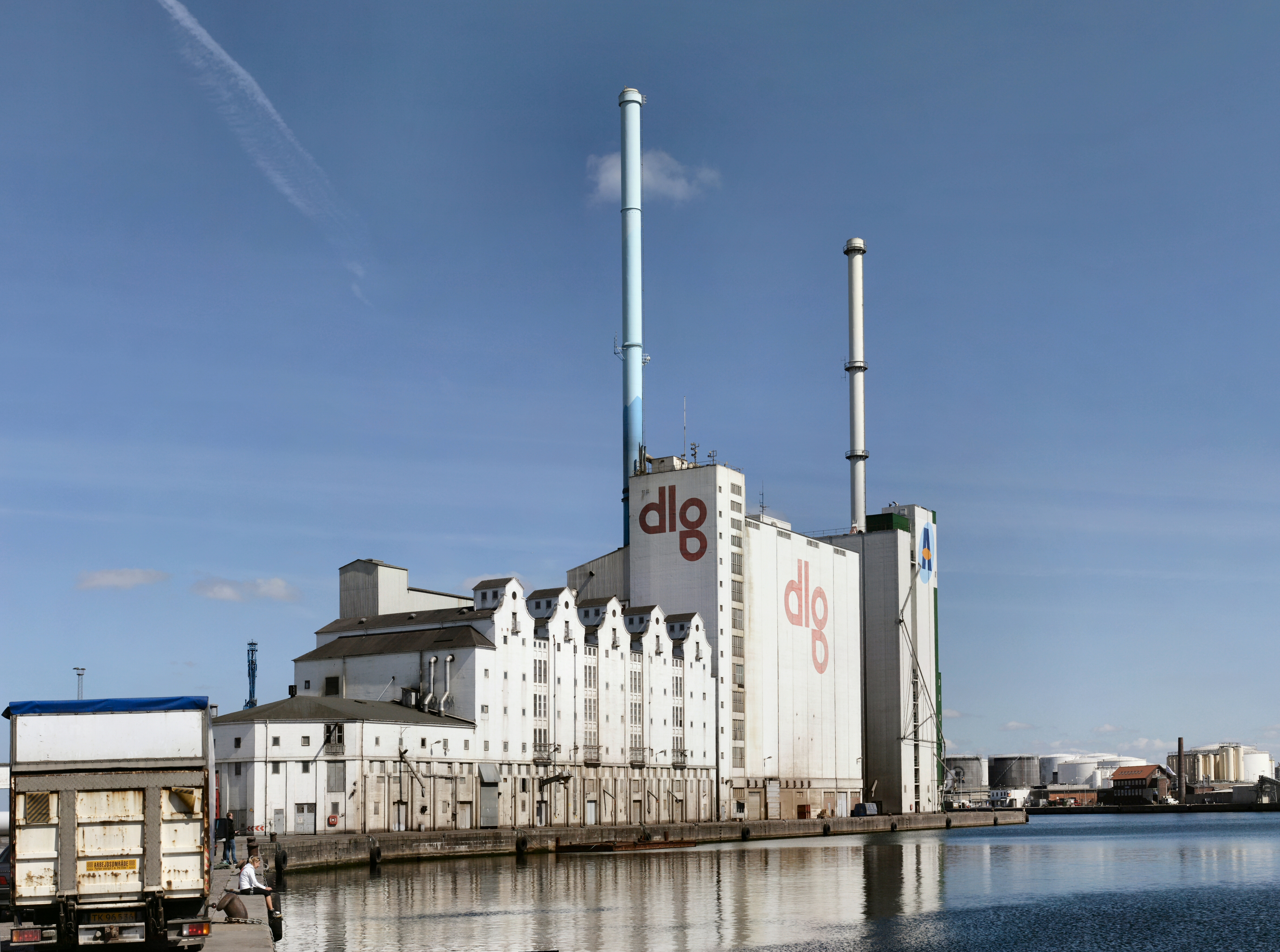 "De fem søstre" på Århus havn